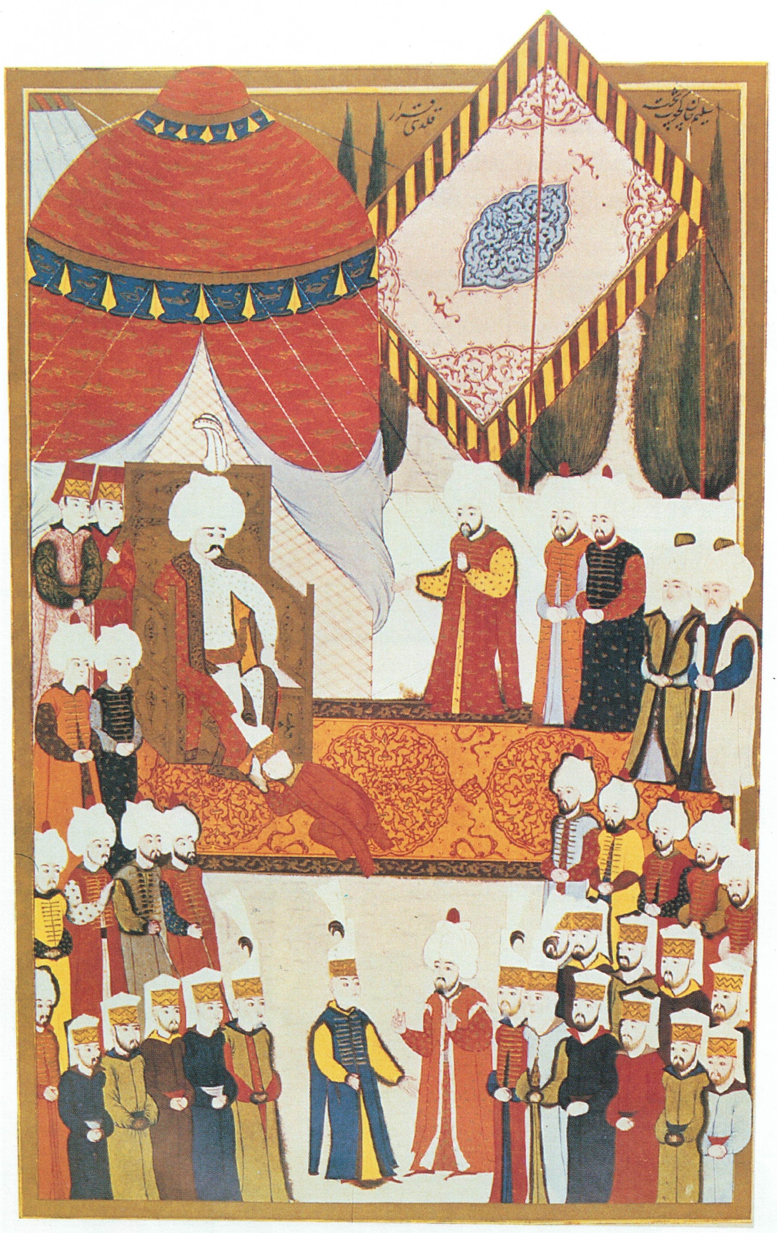 I. Selim'in cülüsu minyatürde